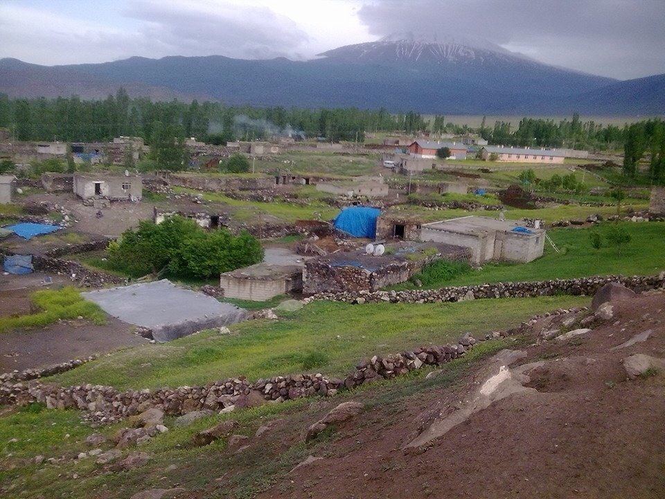 Iğdır karakuyu köyü